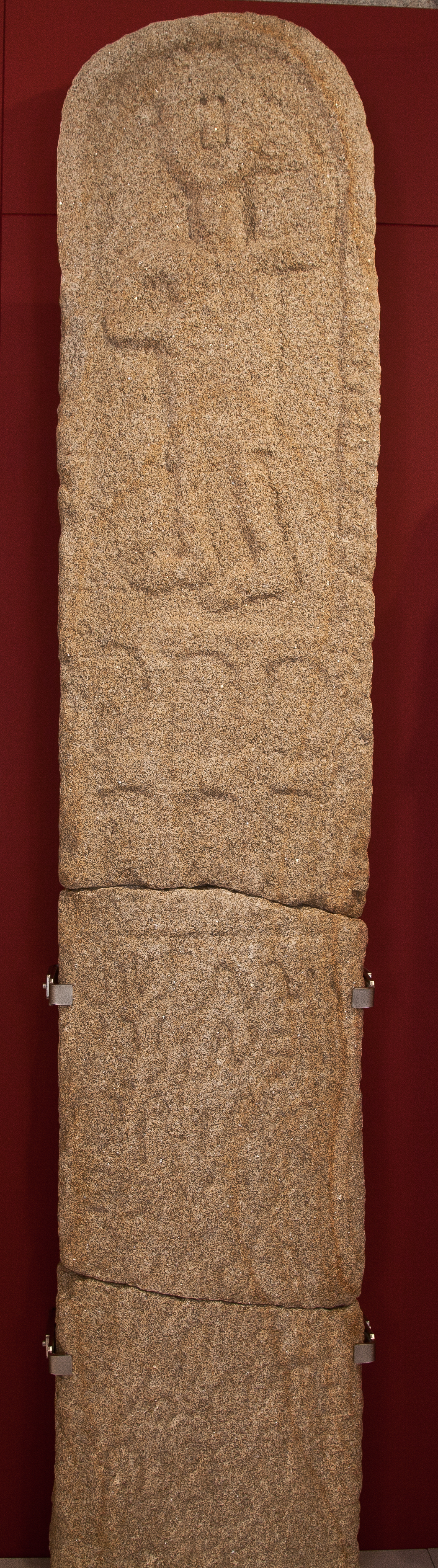 As Miráns, Araño (Rianxo, A Coruña) Transcrición (Pereira Menaut, 1991) Di(b)us M(anib)us pos(u)it [m]e[m]- oria(m) su(o) coniu[g](i) Doirav annoru(um) XXX O V T E P I V S V N E Achado casual Nº. Rex. 2.011 EPIGRAFÍA FUNERARIA Sobre os enterramentos adoitaba erixirse unha estela, formada case sempre por un monolito de dimensión variables rematado en arco ou en frontón. Sobre a súa cara frontal, moi a miúdo xunto con deseños de forte simbolismo relacionados co mundo de ultratumba, e ás veces acompañada por unha imaxe de mellor ou peor factura do propio defunto, aparece a inscrición. Nela, tras unha advocación ás divindades funerarias romanas (D.M.S.: Dis Manibus sacrum: consarado ós deuses Manes), adoita mencionarse o nome do defunto, a súa idade, a identidade do dedicante e outros datos variados ata concluír as máis das veces coa fórmula S. T. T. L (Sit tibi terra levis: que a terra che sexa leve). As inscricións funerarias aportan información de gran valor sobre, por exemplo, a onomástica da época e a esperanza de vida.